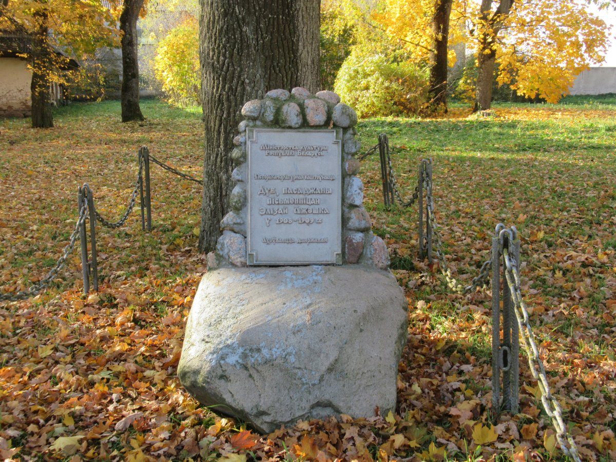 Флер’янова. Дуб Элізы Ажэшкі